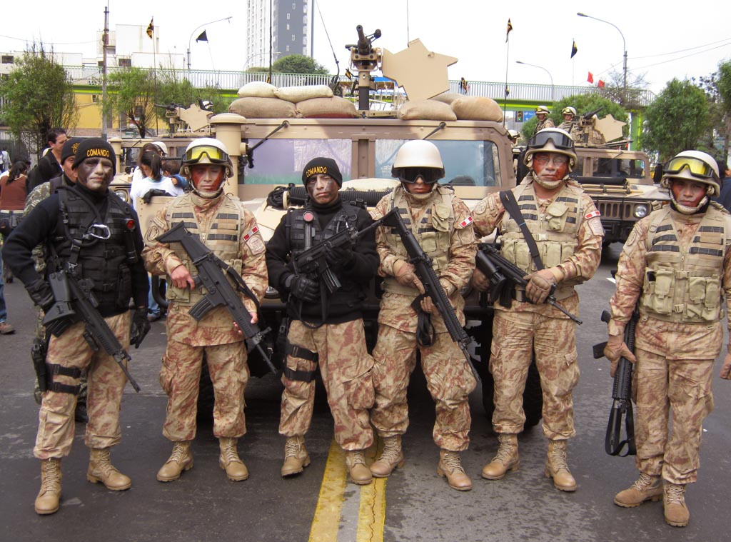 Comandos peruanos en la Parada Militar 2011